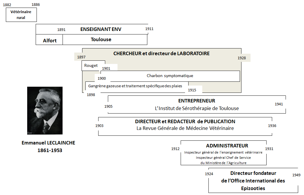 Chronologie de la carrière et des activités d'Emmanuel Leclainche (1861-1953), docteur vétérinaire, professeur à l'Ecole nationale vétérinaire de Toulouse, microbiologiste pastorien, inspecteur général de l'enseignement vétérinaire, inspecteur général et chef des services du ministère de l'agriculture, cofondateur de l'Institut de Sérothérapie de Toulouse